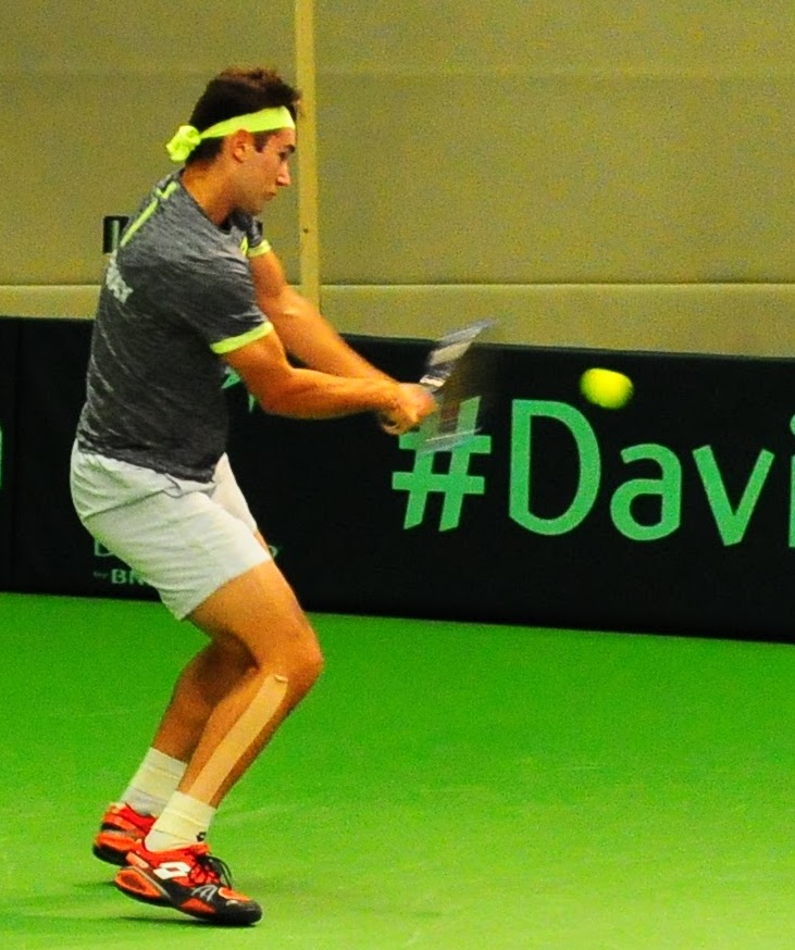 Viktor Durasovic slår en backhand mot Frederik Nielsen, Davis Cup Norge mot Danmark.